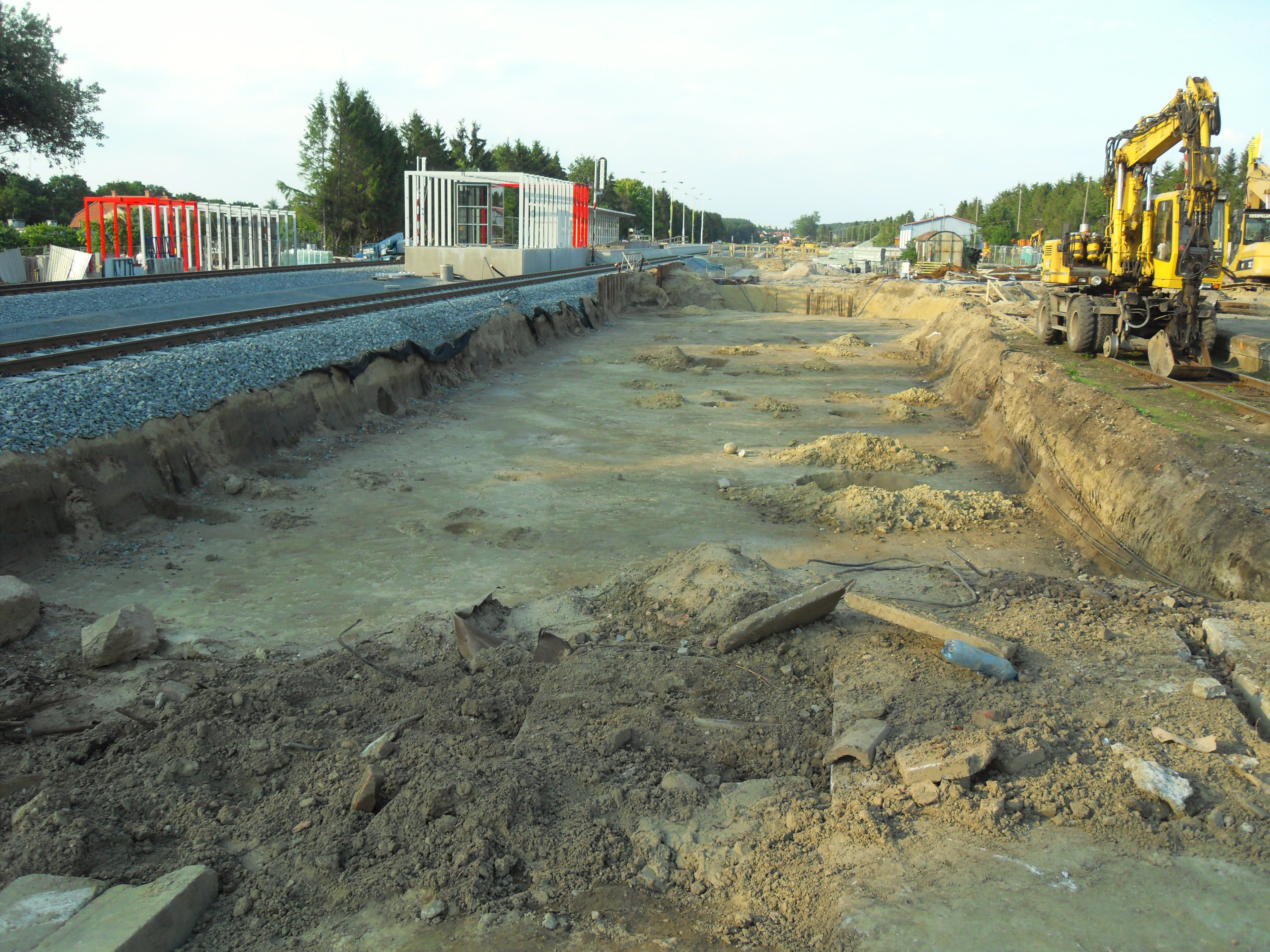 Stacja kolejowa Gdańsk Osowa, przebudowa przed włączeniem do Pomorskiej Kolei Metropolitalnej (PKM).